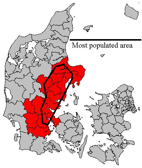 East jutland metropolitan